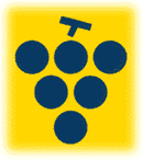 Vlag Overijse.